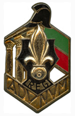 Insigne du 6e régiment étranger du génie type 1